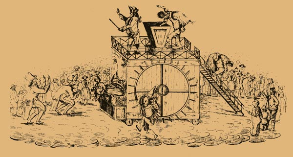 Aufführung der "Weibermühle von Tripstrill" in Wolfach, 1836; Lithographie